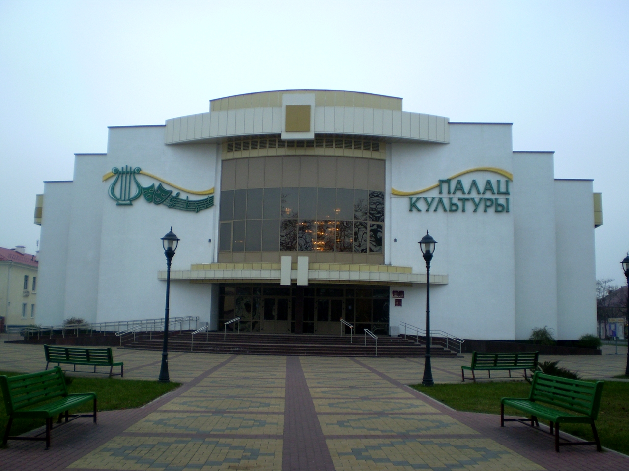 Палац Культуры